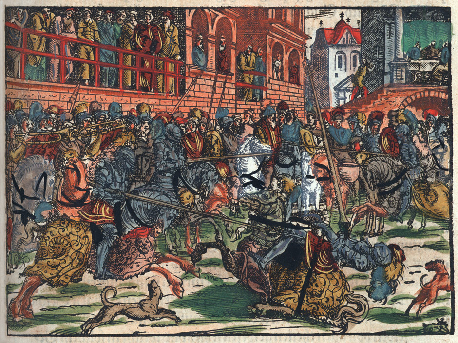 Colorized woodcut from: (Rüxner, Georg). Thurnierbuch, das ist, Warhaffte, eigentliche, vnd kurtze Beschreibung von Anfang, Vrsachen, Vrsprung, vnd Herkommen der Thurnier im Heyligen Romischen Reich Teutscher Nation, wie viel offentlicher Landthurnier von Keyser Heinrichen dem Ersten dieses Namens an biss auff Keyser Maximilian den Andern ... vnd in welchen Statten die alle gehalten, auch durch welche Fursten, Graffen, Herrn, Ritter, vnd vom Adel dieselben jeder Zeit besucht worden, Frankfurt am Main, Reffeler für Feyerabend, 1578-79